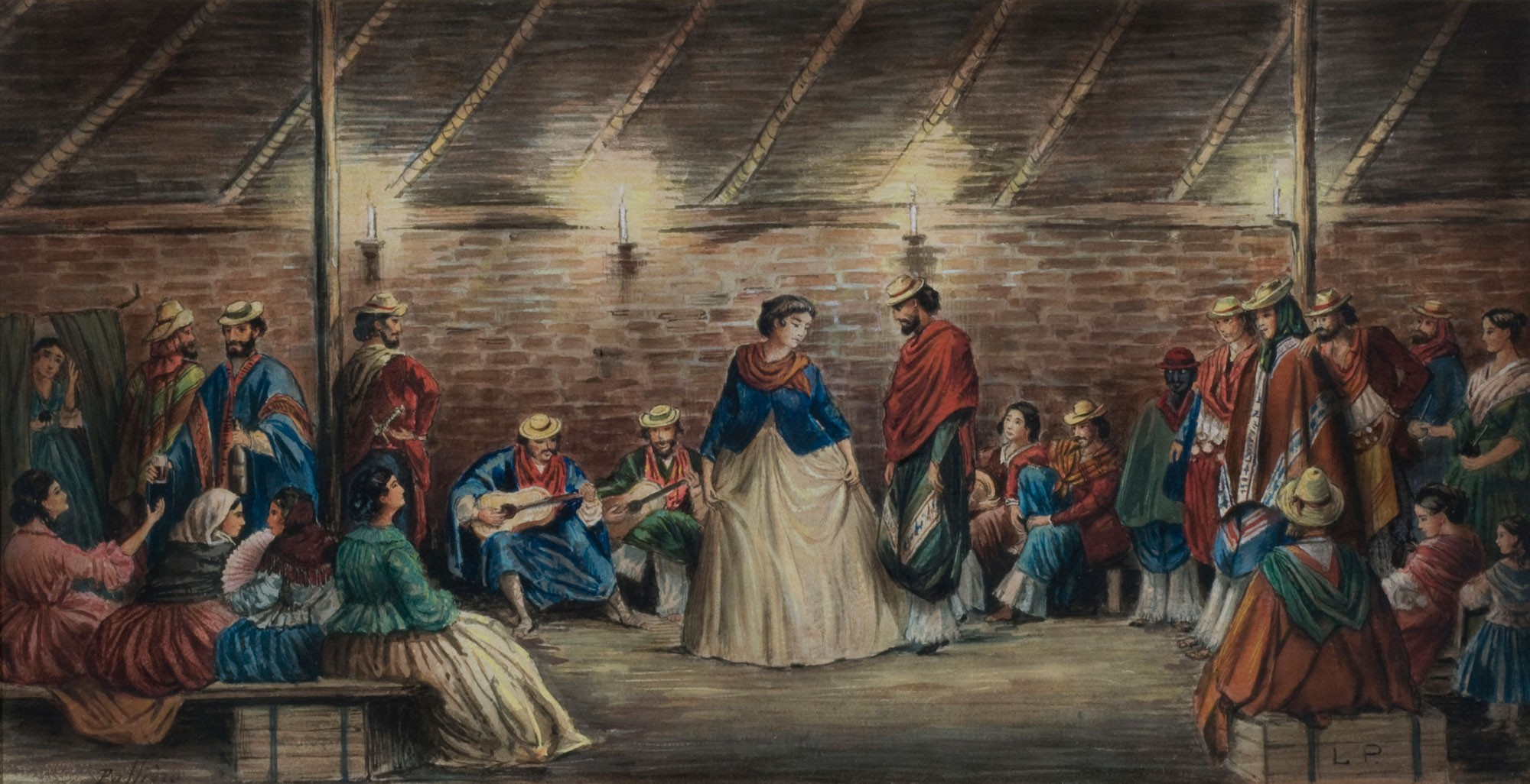 Nombre, Bailando el gato.